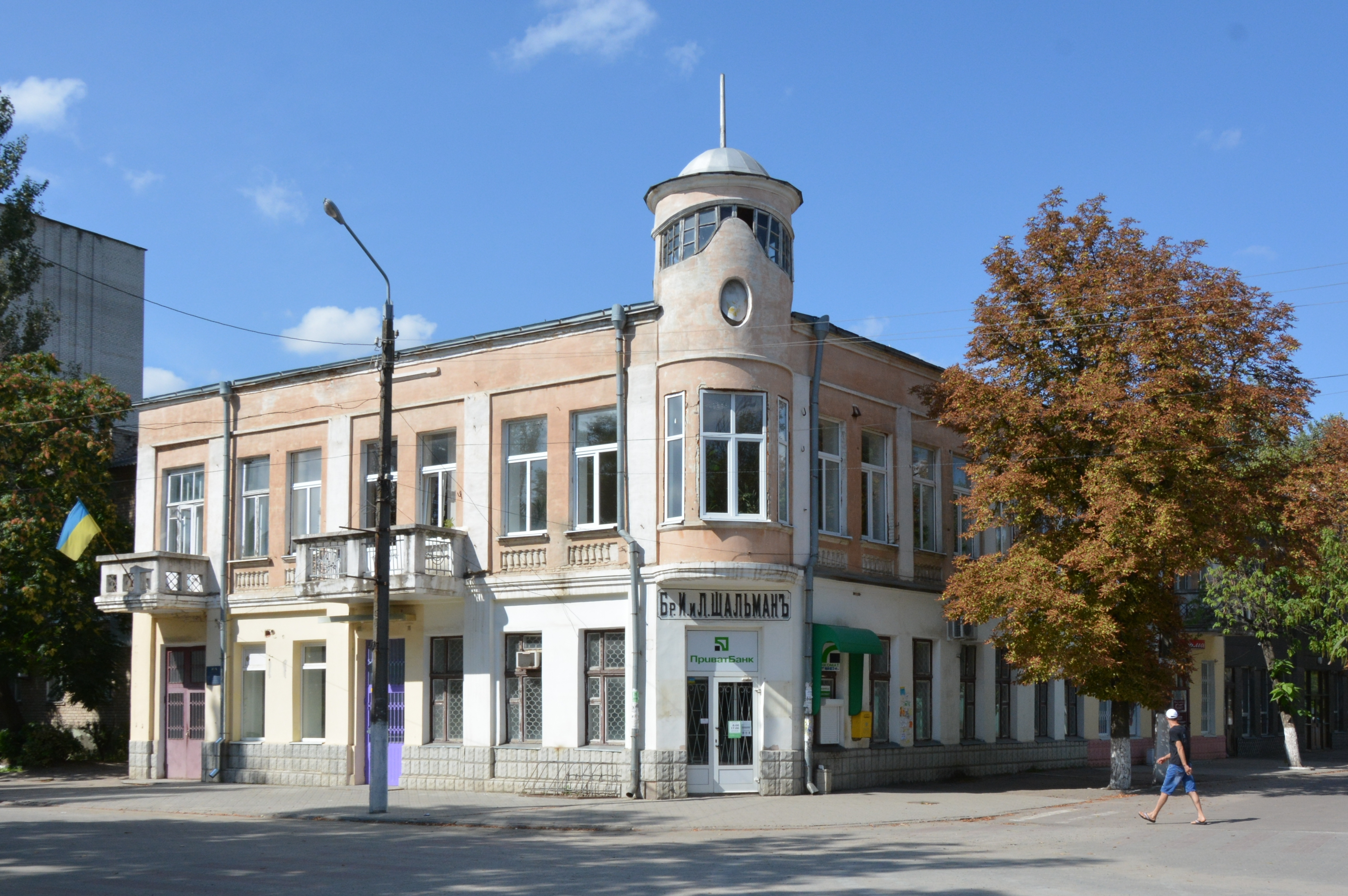 Торговий будинок Я. Шальмана, Токмак, вул. Т. Шевченка, б/н